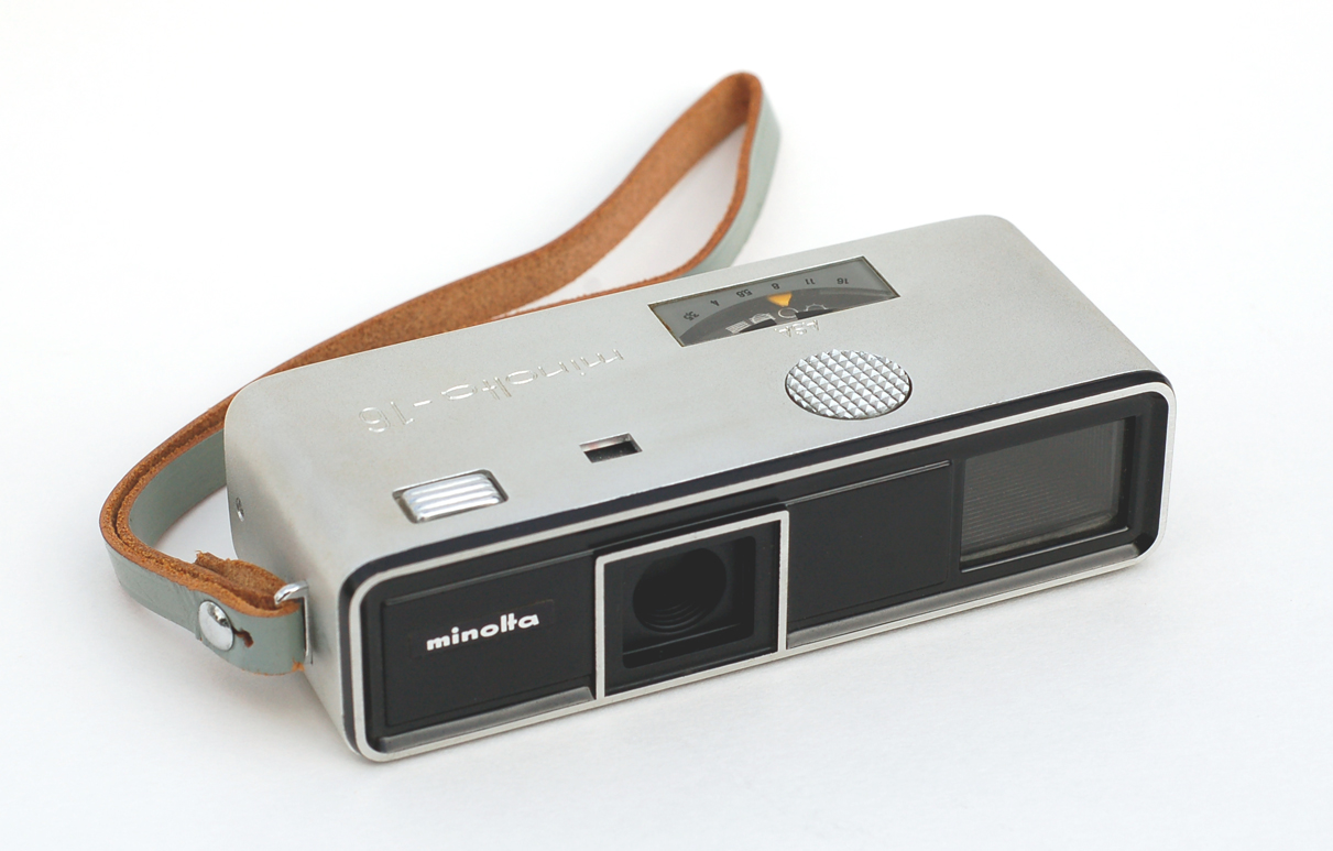 aparat fotograficzny Minolta 16 Model P